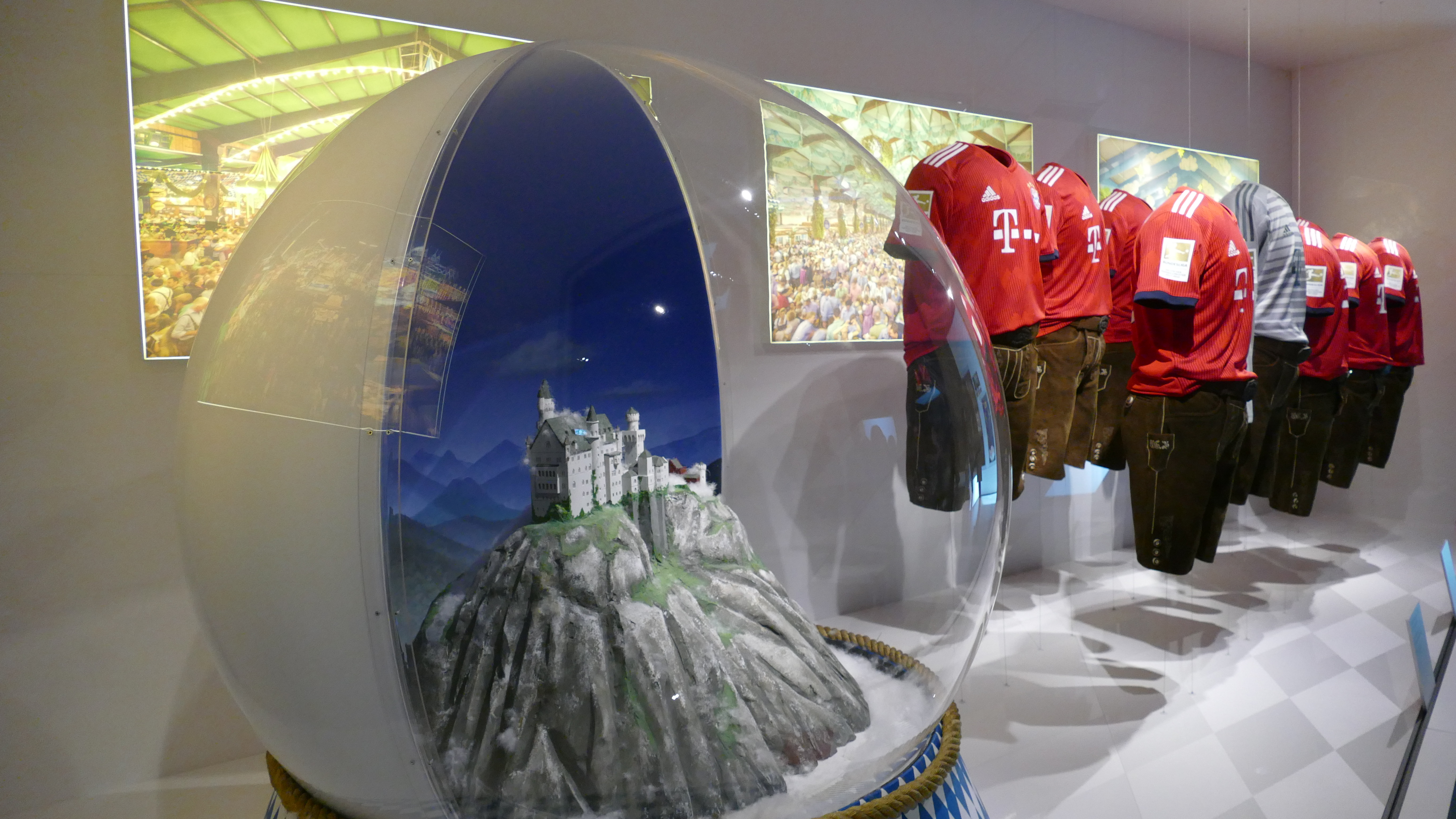 Foto aus der Dauerausstellung des Hauses der Bayerischen Geschichte, entstanden bei der "Kultour" am 24. November 2019. Mit der freundlichen Freigabe des Hauses der Bayerischen Geschichte